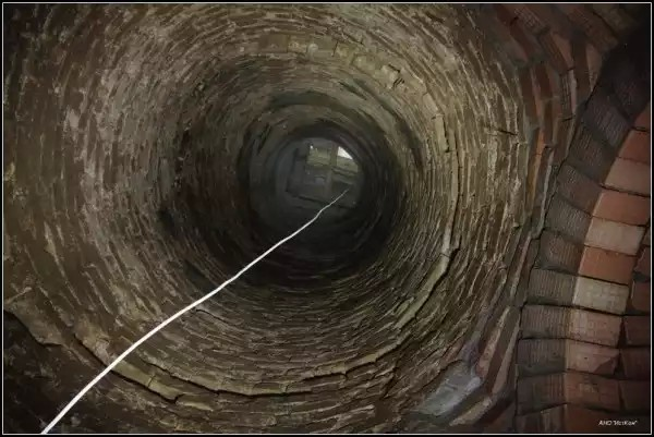 Пещеры Бузулукского Спасо-Преображенского монастыря. Вид на ствол шахты пещер. Также видны следы винтовой лестницы.